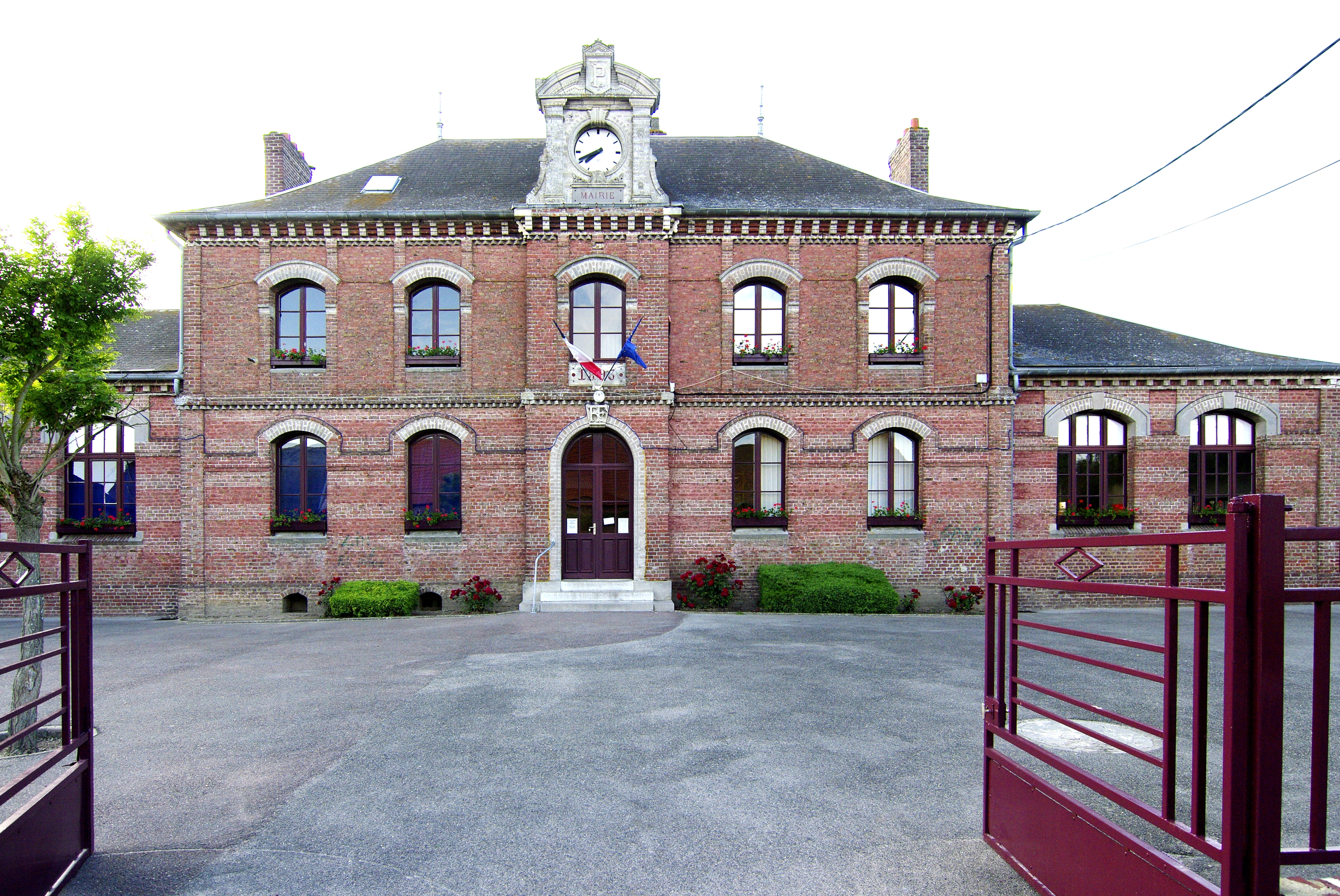 La Mairie/école du village de Pendé, Somme.